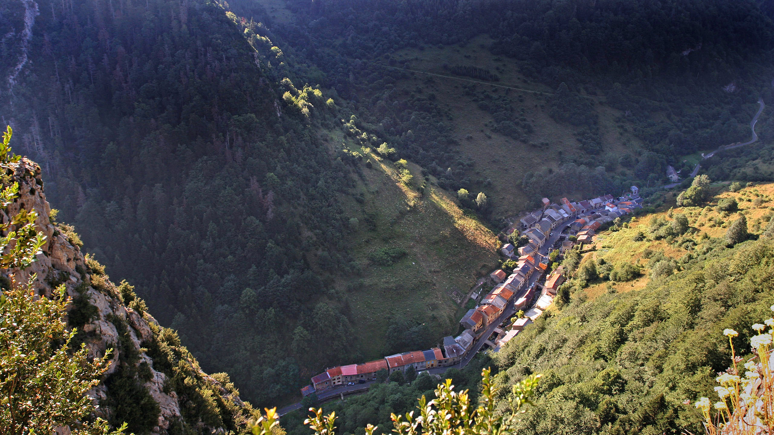 Lever de soleil